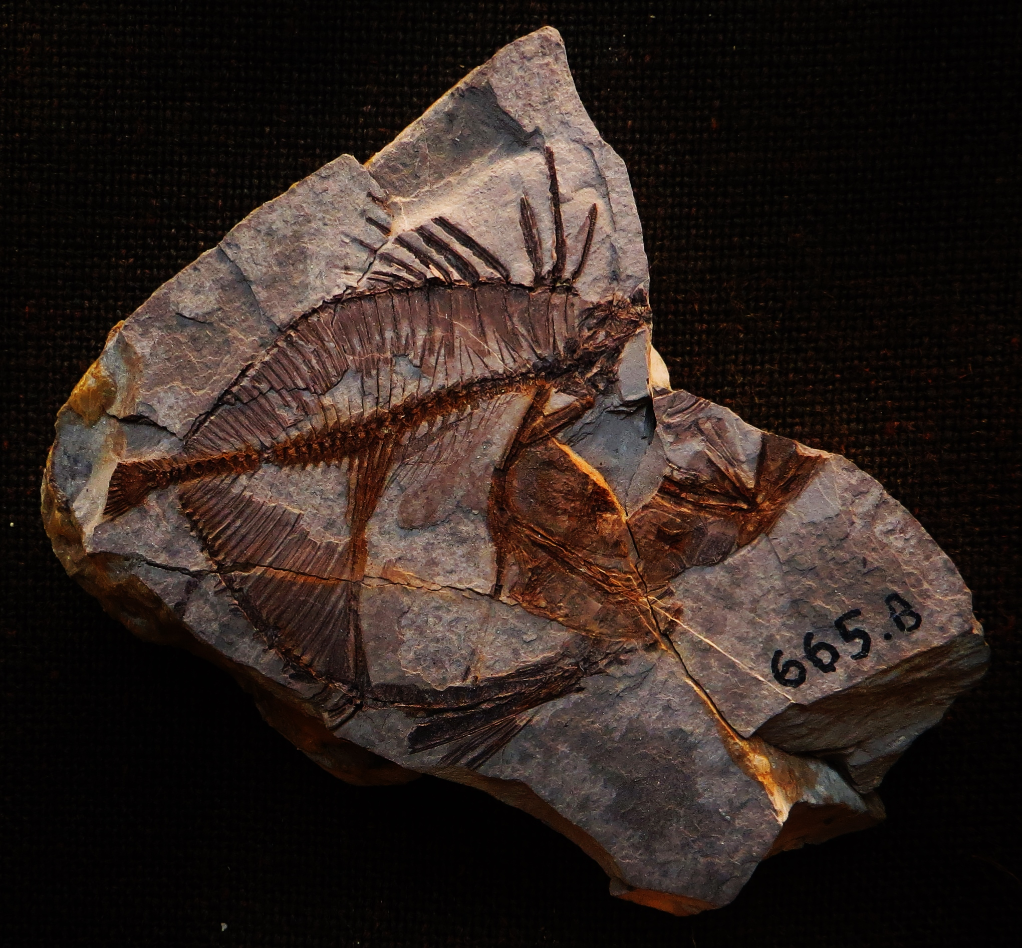 Took the picture at Burgmeister Muller Museum, Solnhofen